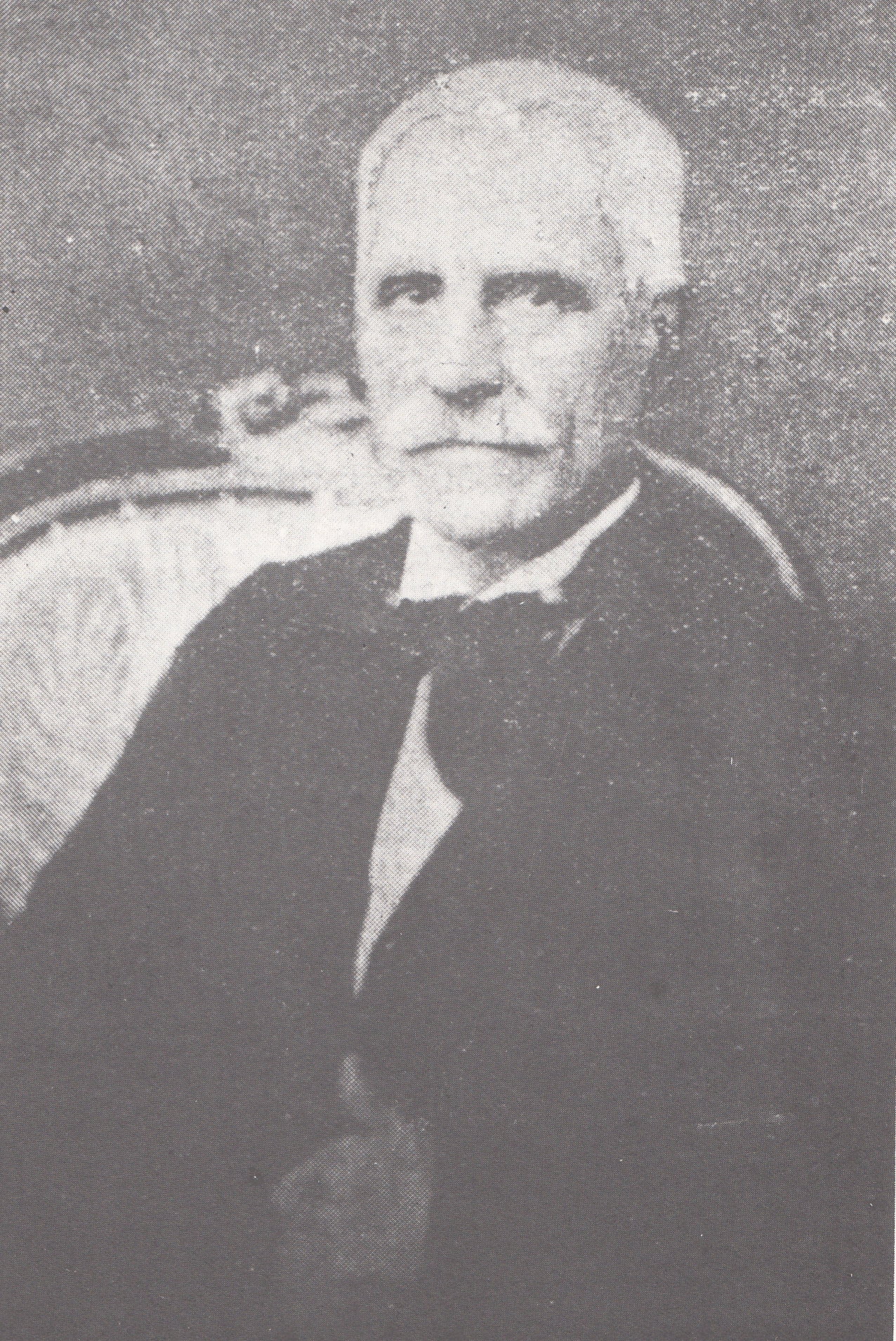 Evangelista Andreoli (1810-1875)